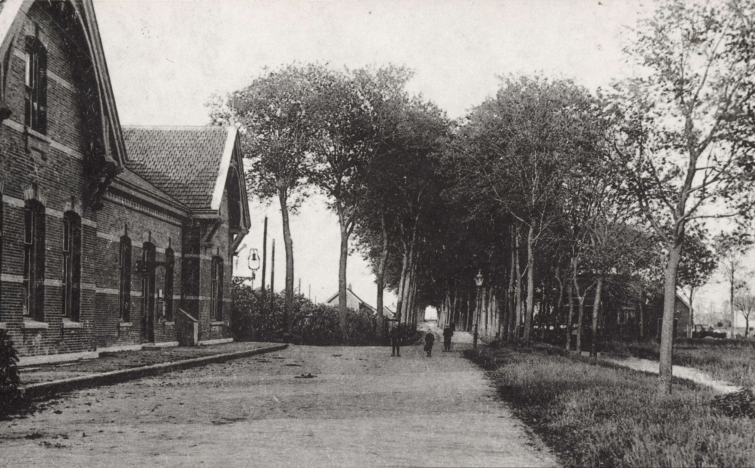 Station Bedum in 1920. Reproductie (1986) van een prentbriefkaart uit 1920.